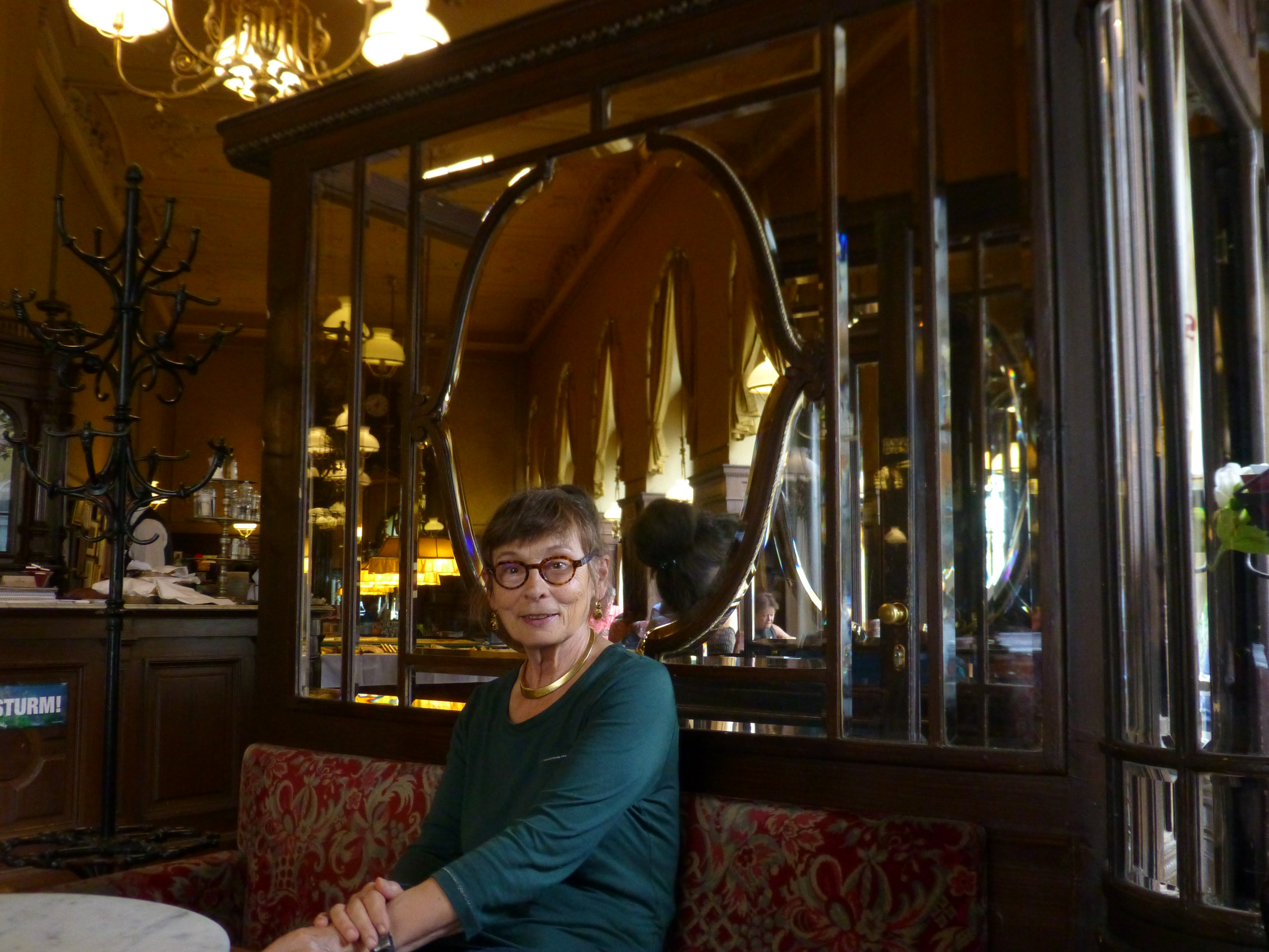 Gisèle Bienne à Vienne, Autriche